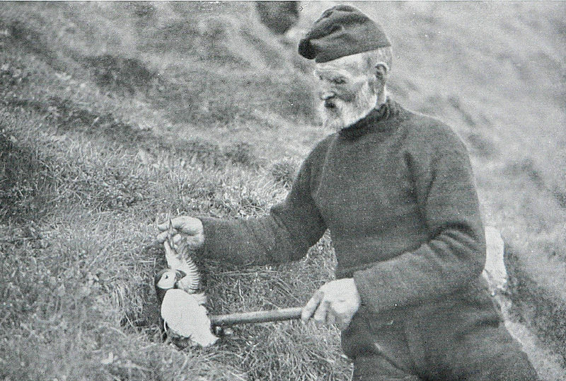 Hans Pauli Hansen (født 1866) under fuglefangst på Mykines på Færøyene.